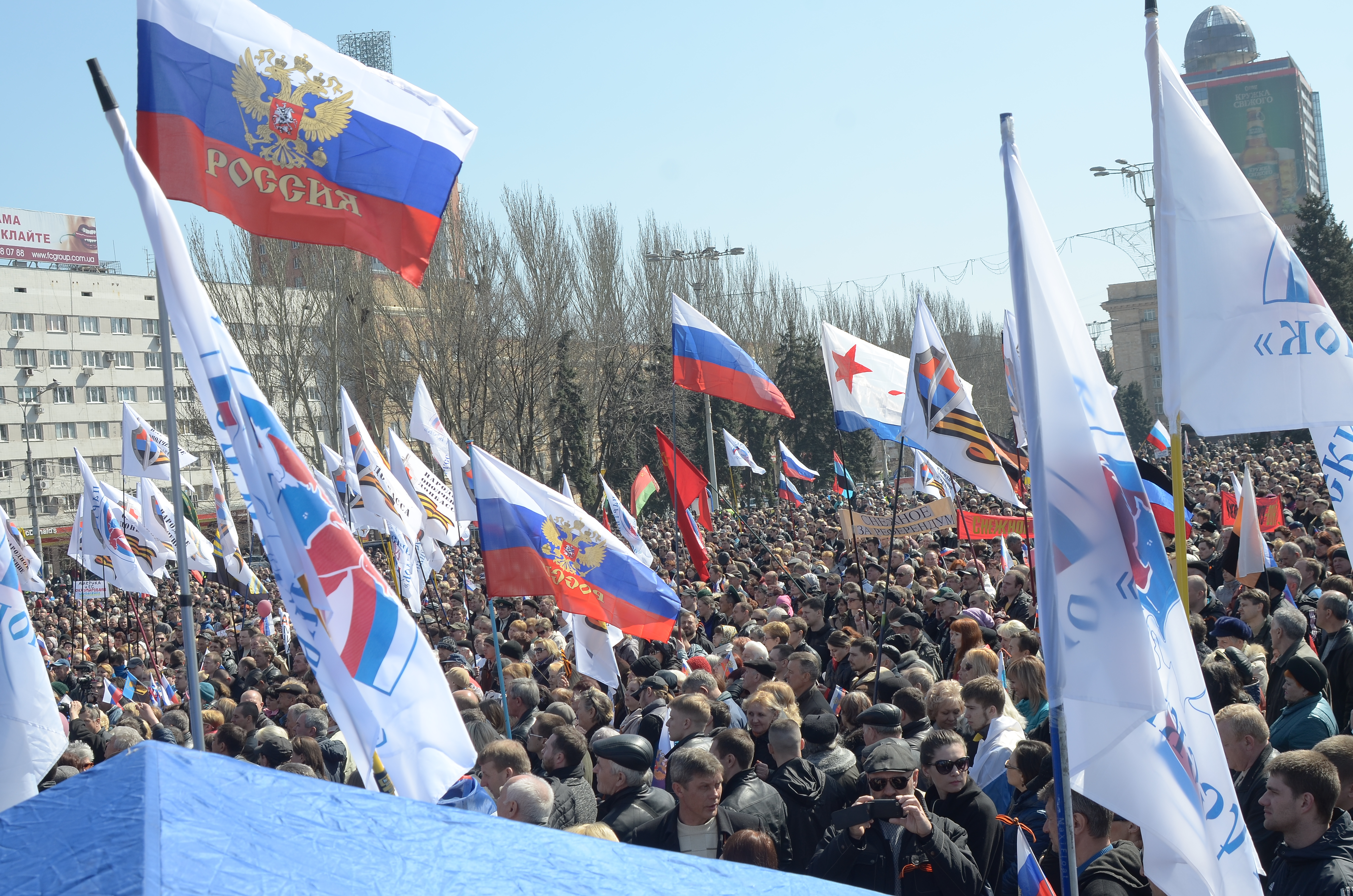 Протесты в Донецке